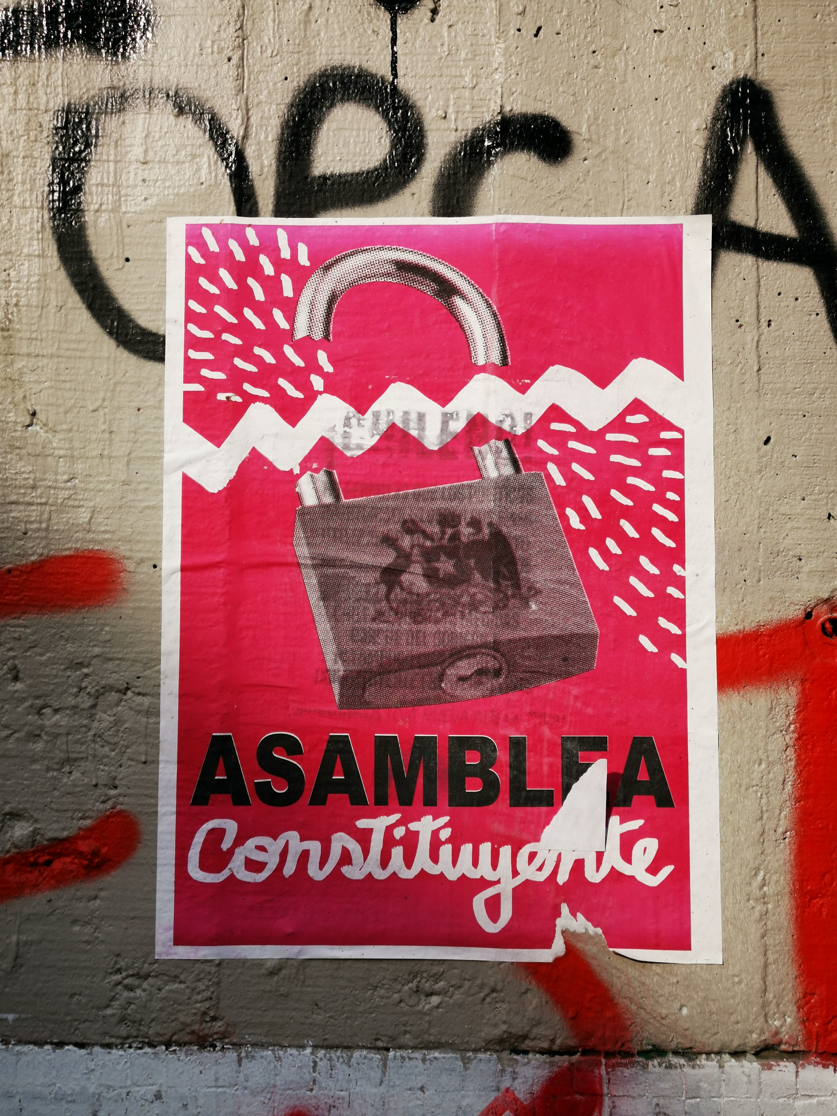 Póster a favor de una asamblea constituyente durante las protestas de noviembre de 2019 en Santiago.